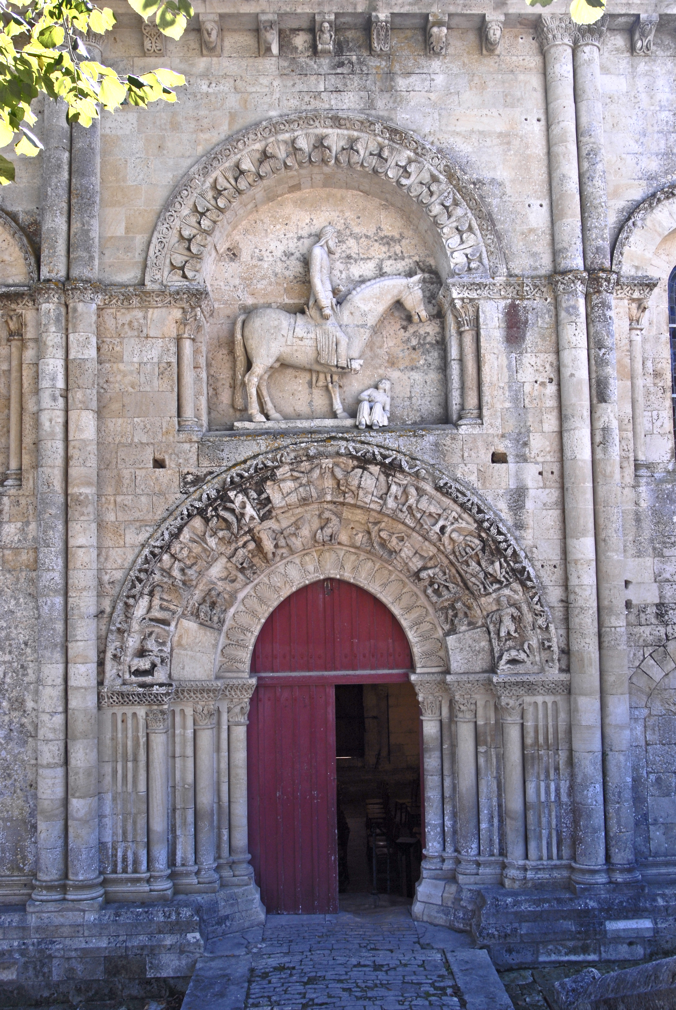 Melle, st.-Hilaire, Südportal